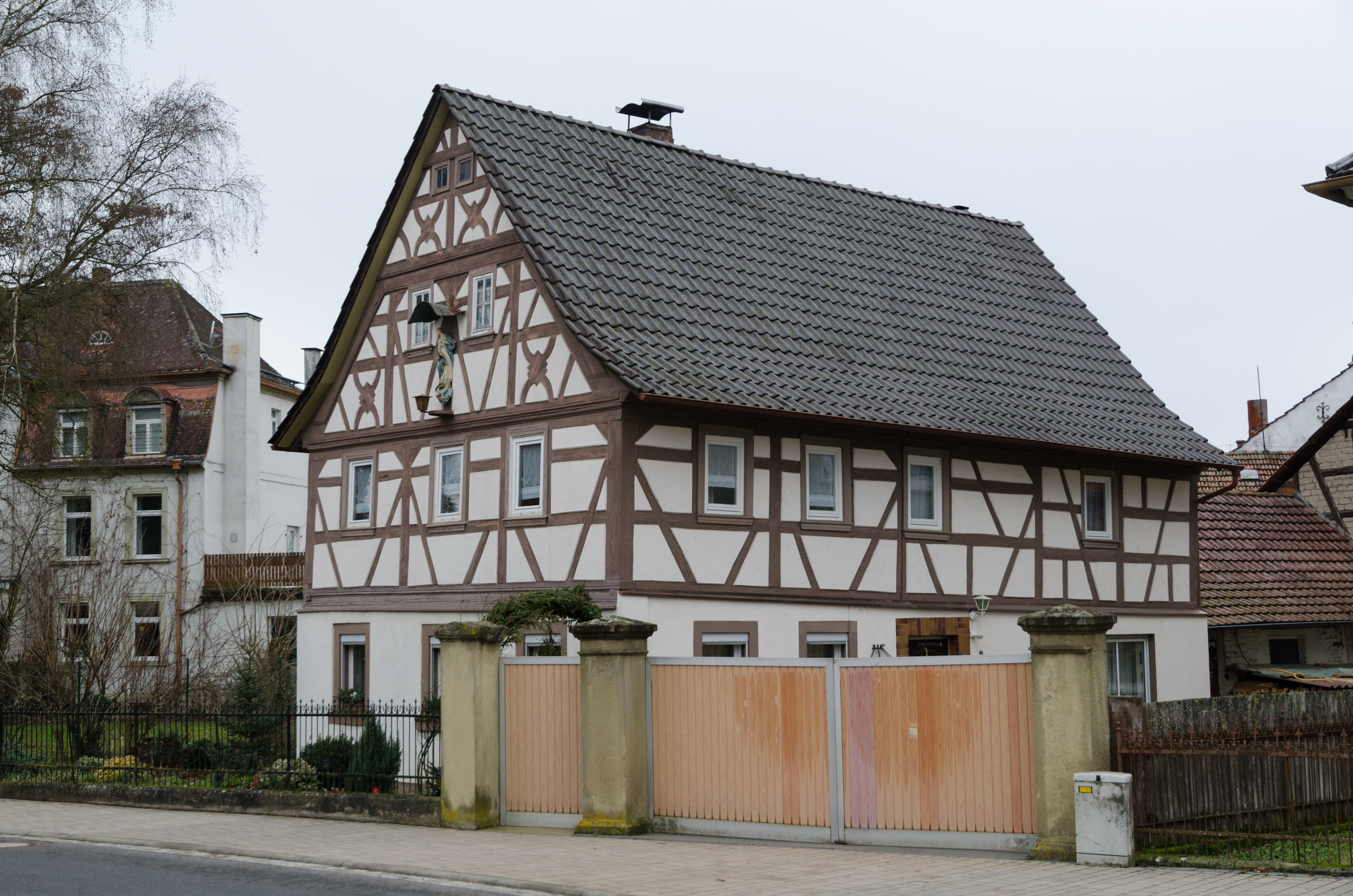 Thundorf i.Ufr., Parkstraße 5